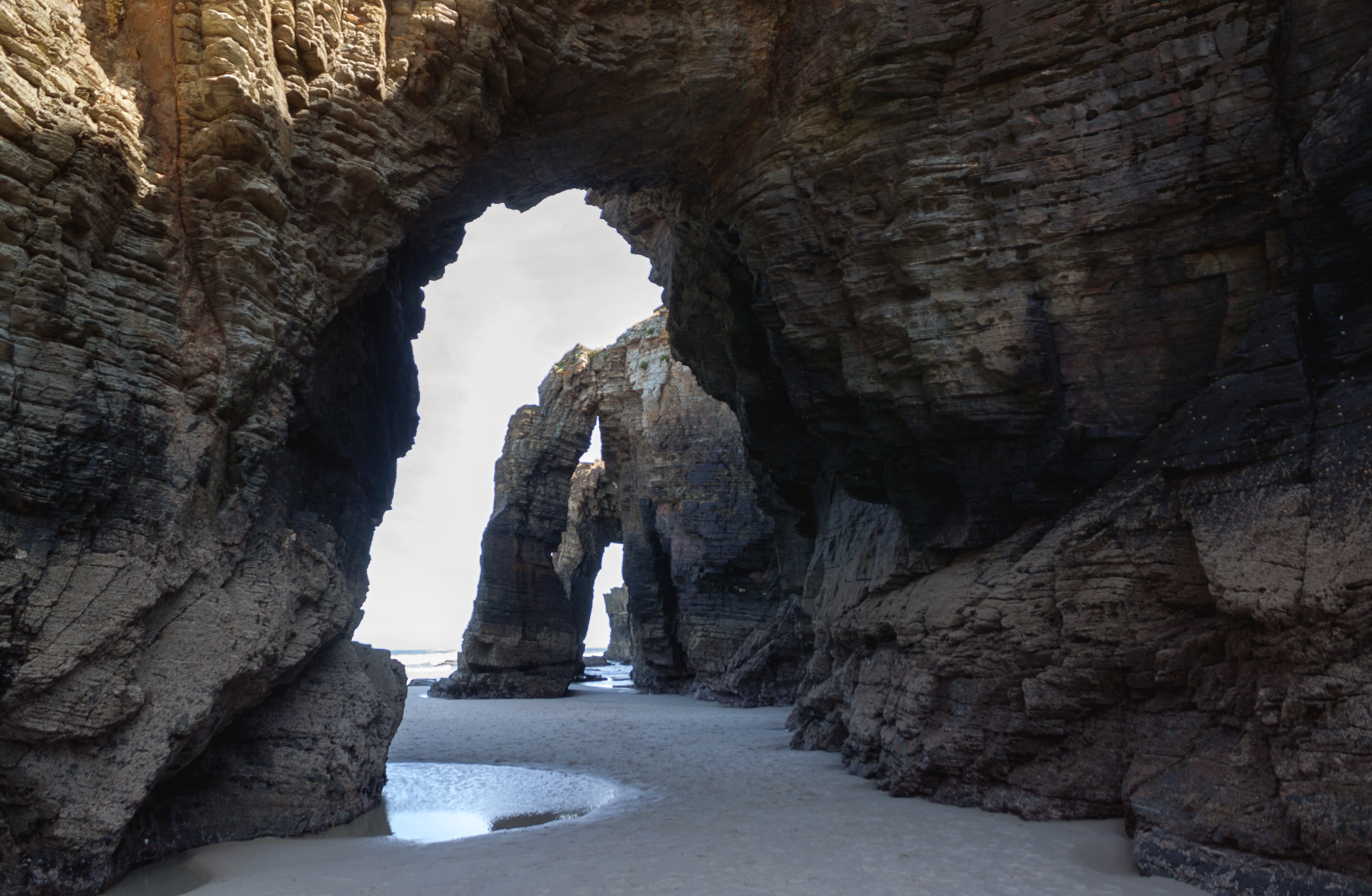 Wenn die Flut kommt ,ist alles wieder unter Wasser ...so sieht man diese Formationen nur bei Ebbe Las Kathedrales Ribadeo / Galicien - Spain